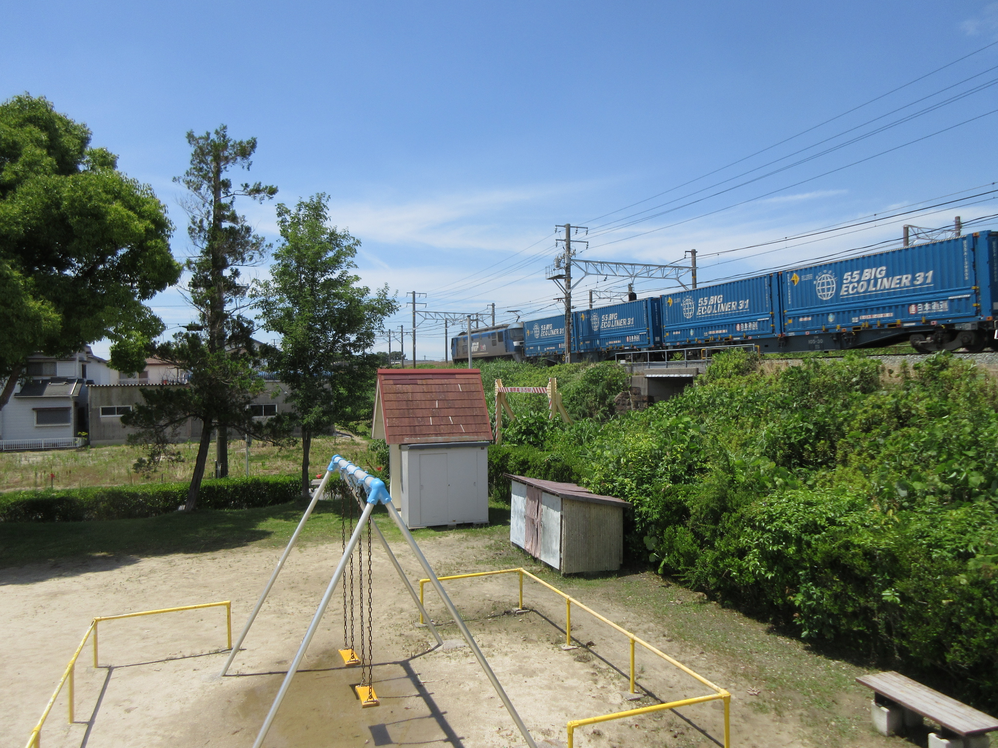 中村公園（岡崎市城南町）